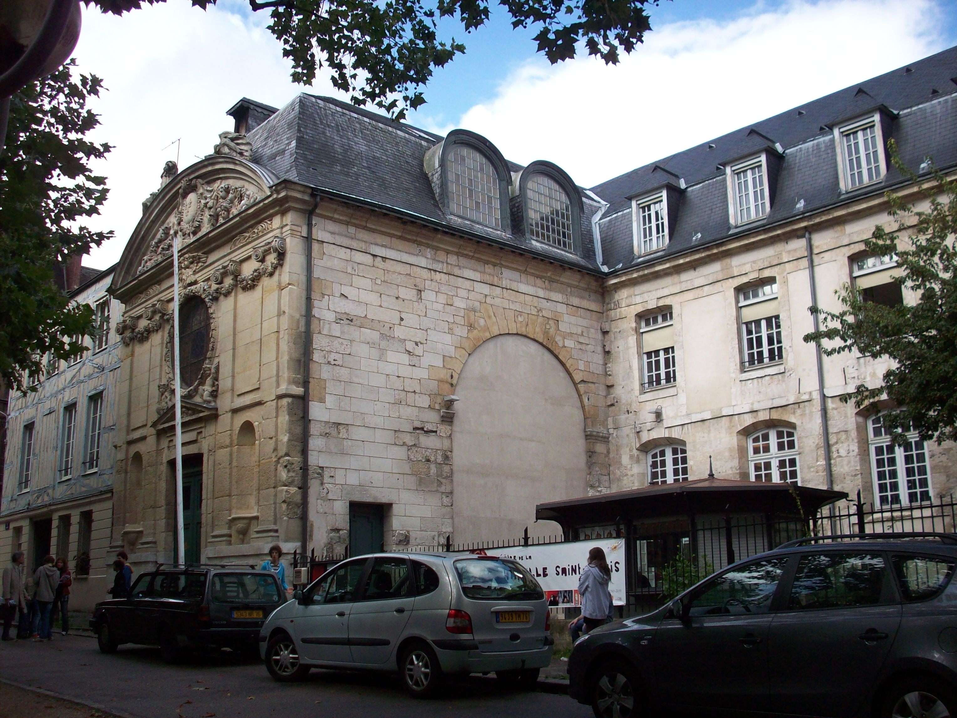 Ancienne chapelle Saint-Louis-de-la-Rougemare à Rouen, elle accueille depuis 1991 un théâtre.